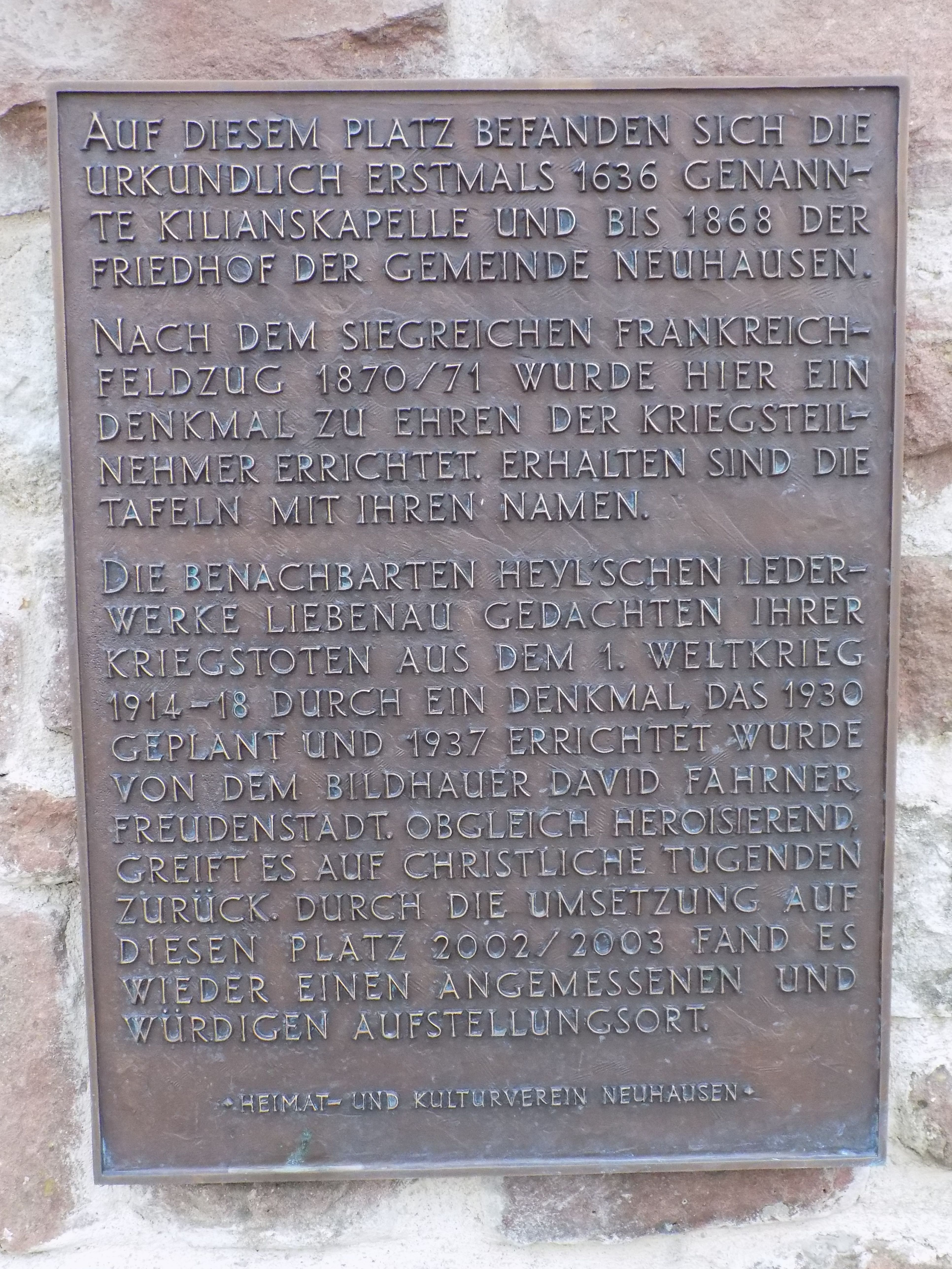 Inschrit Wand Südwest